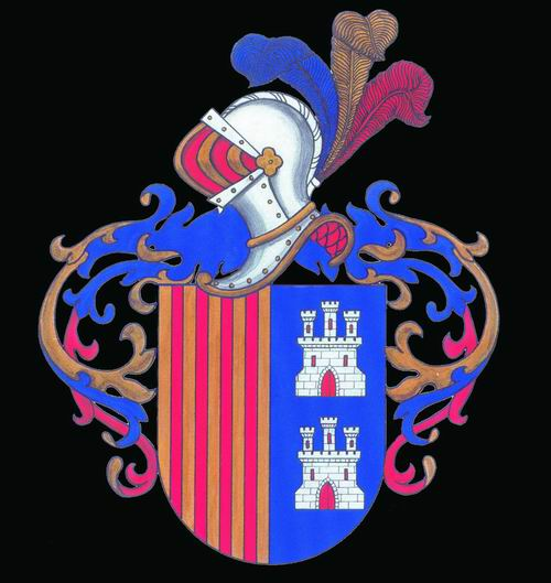 Stammwappen der Familie de Zayas Datum: ca. 12. Jahrhundert Urheber: frühmittelalterlicher Heraldiker Quelle